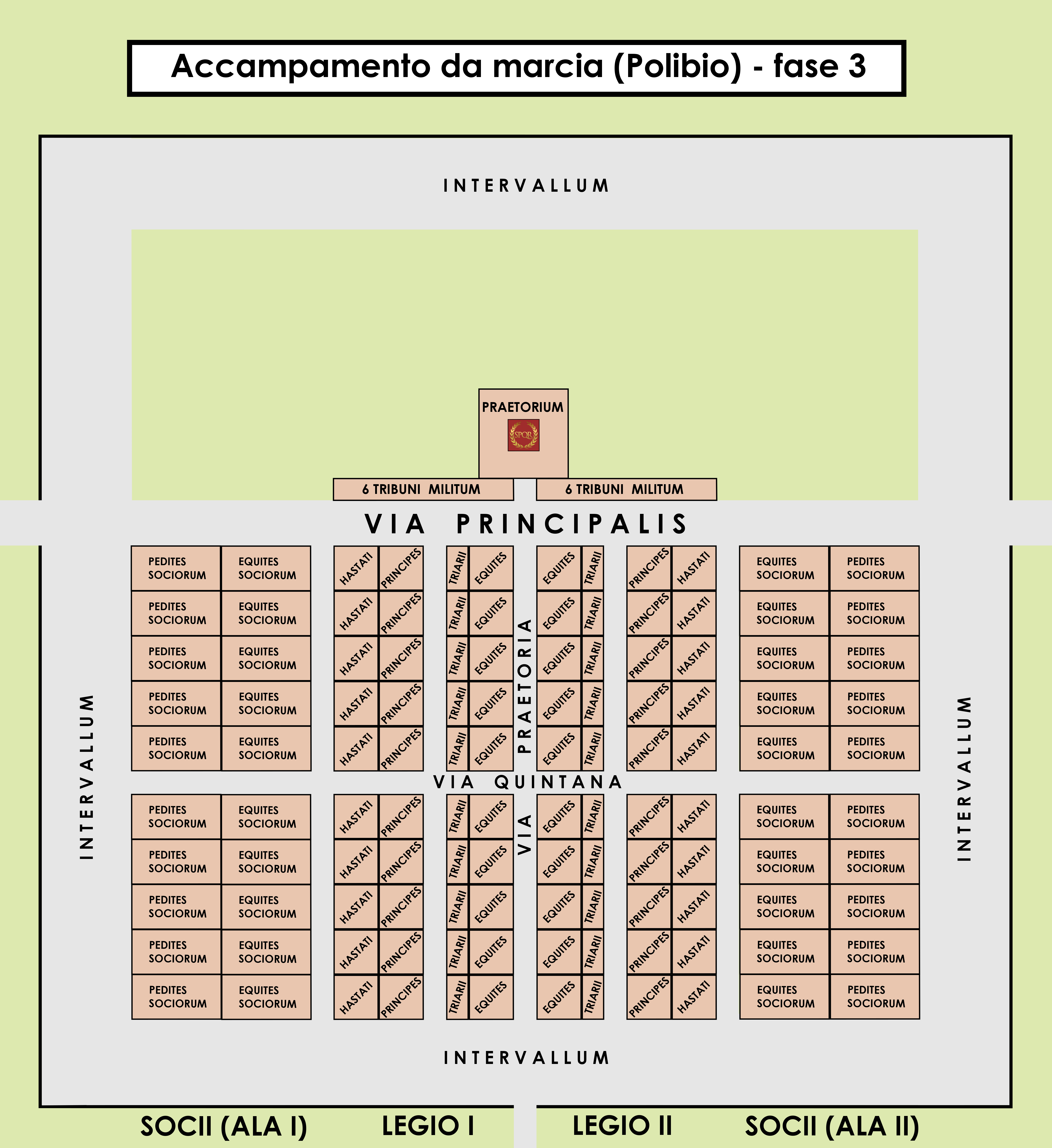 L'accampamento militare romano da marcia secondo Polibio: la terza fase consiste nel disporre gli alloggiamenti delle truppe alleate (socii)